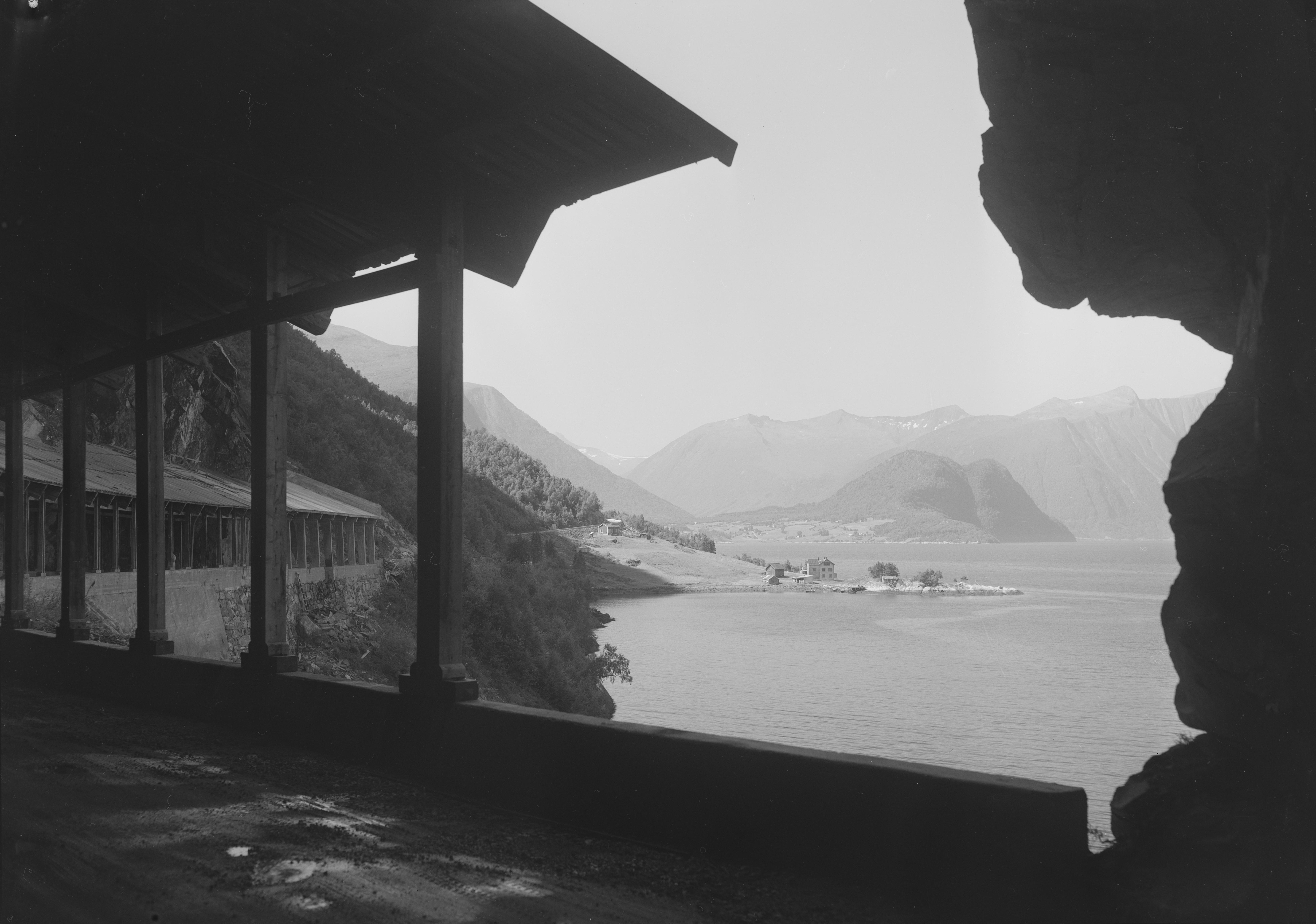 Bildet er hentet fra Nasjonalbibliotekets bildesamling. Anmerkninger til bildet var: Fotograf : ukjent Innfjorden,Innholmen,Romsdalsfjorden,Søvika, Rauma, Møre og Romsdal